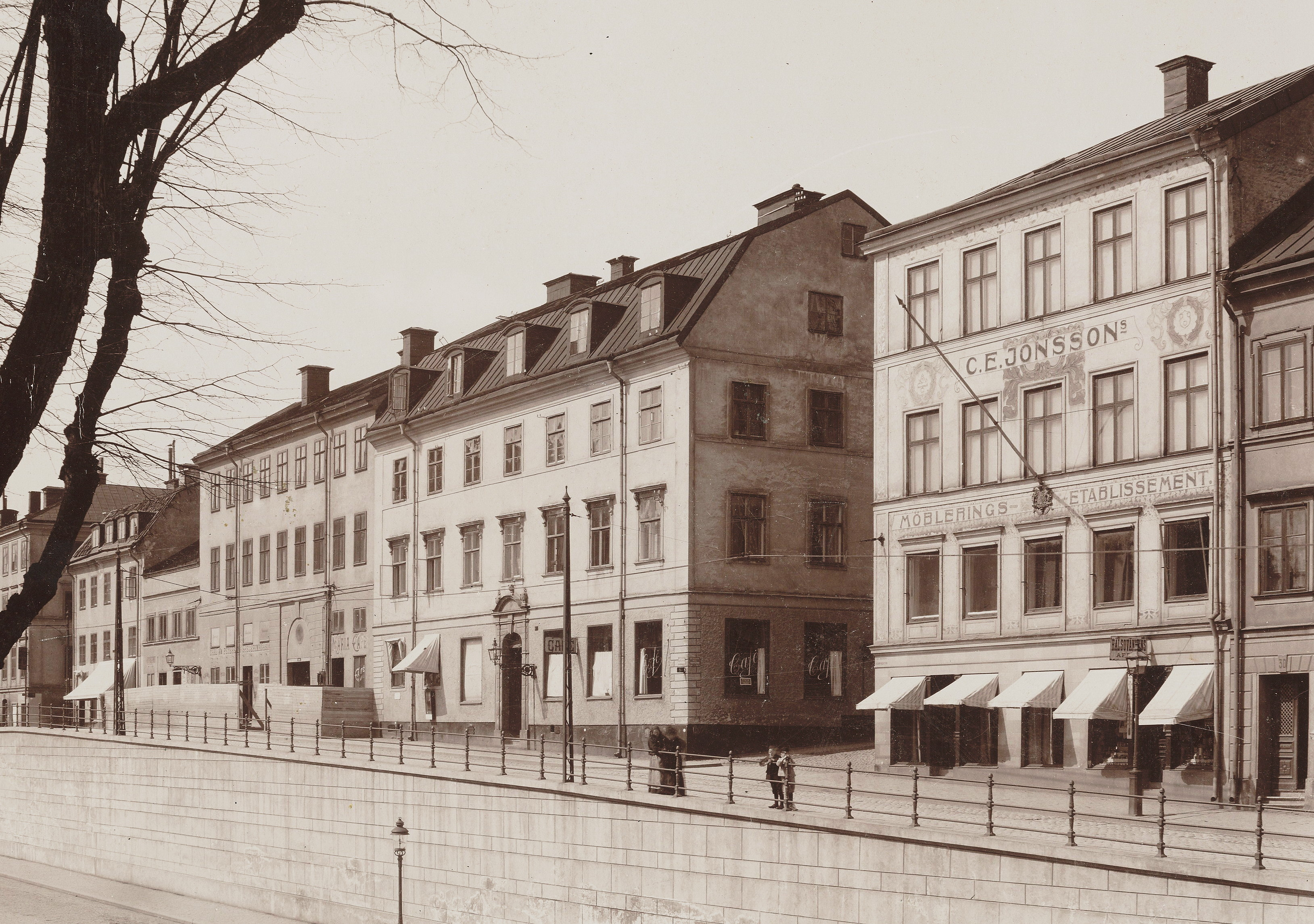 Hornsgatan 34-38, med Hornsgatspuckeln och kvarteret Svalgången, till höger ansluter kvarteret Stenbocken